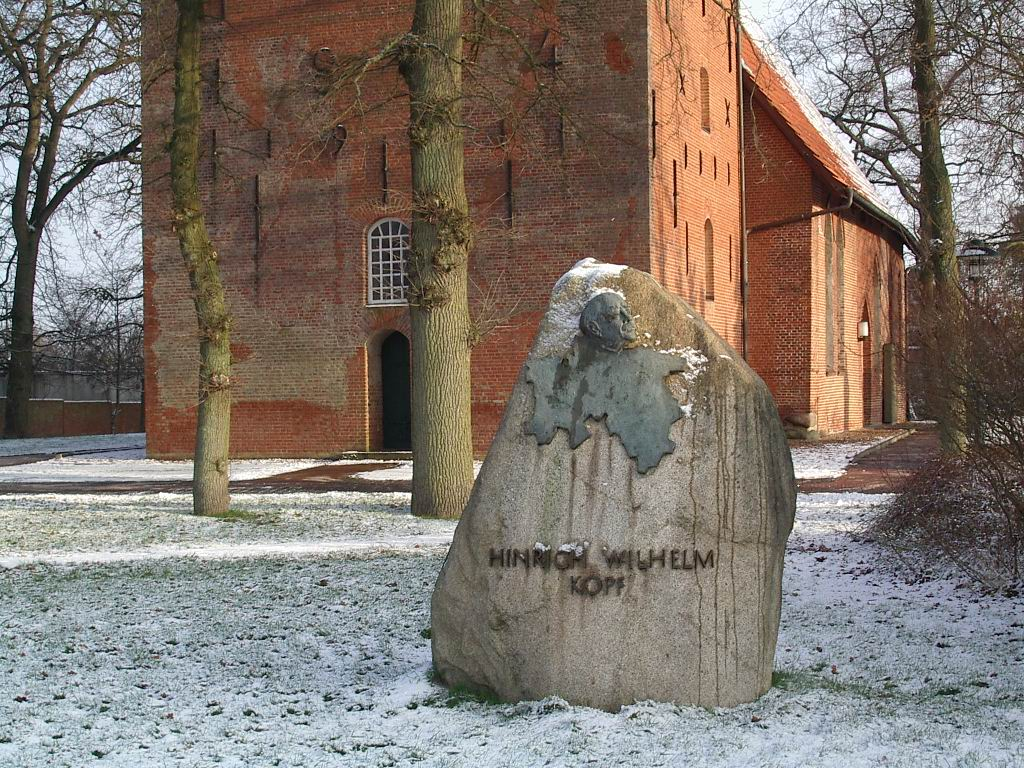 Photo taken by User:Geoz January 2006 Das Denkmal für Hinrich Wilhelm Kopf, vor der St. Marien-Kirche in Neuenkirchen (Land Hadeln)